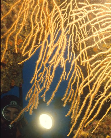 Area Marina Protetta Capo Gallo, Palermo, Sicily Eunicella cavolinii